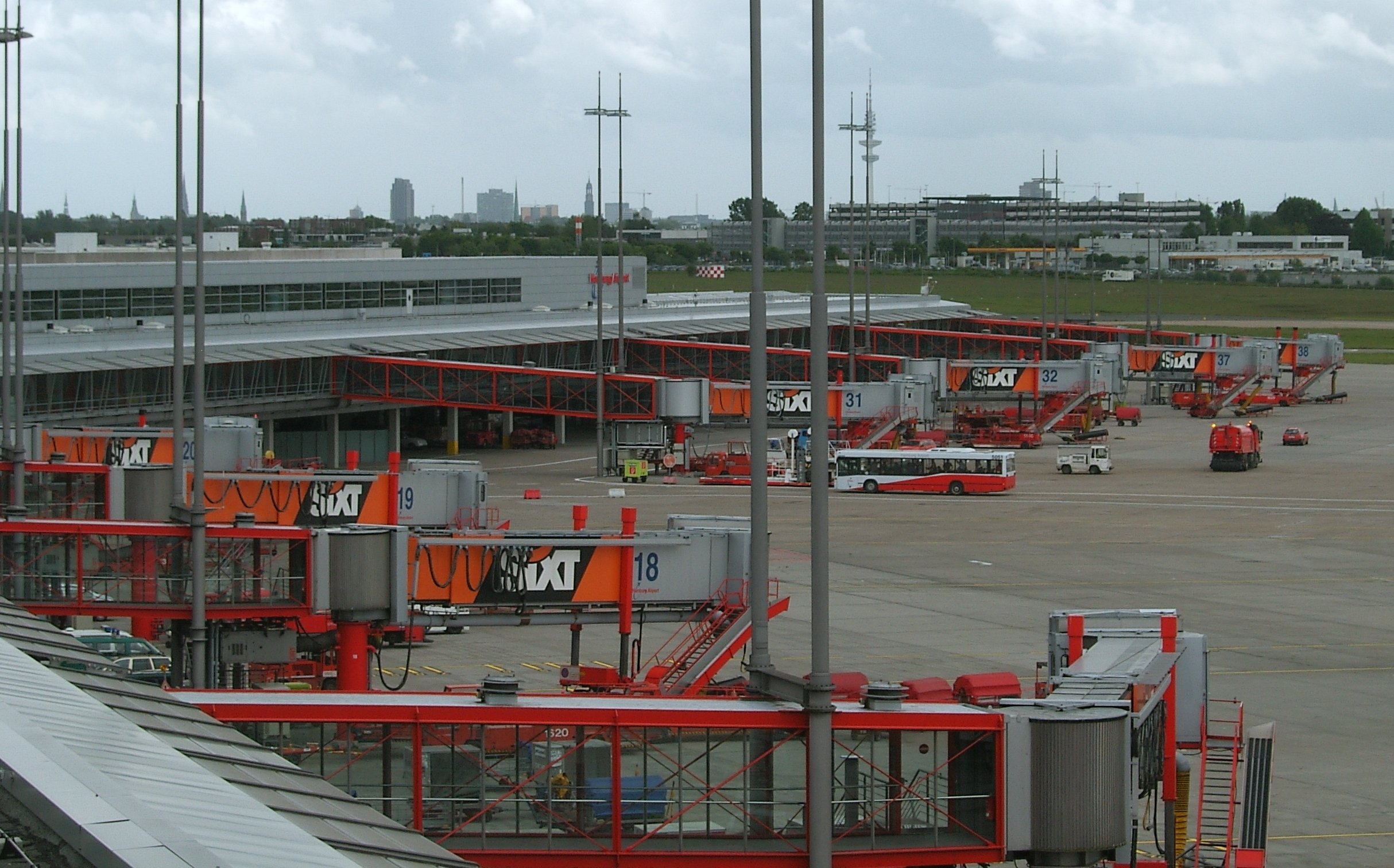 Hamburg, Fuhlsbüttel, Flughafen, Blick von der Terrasse Terminal 1